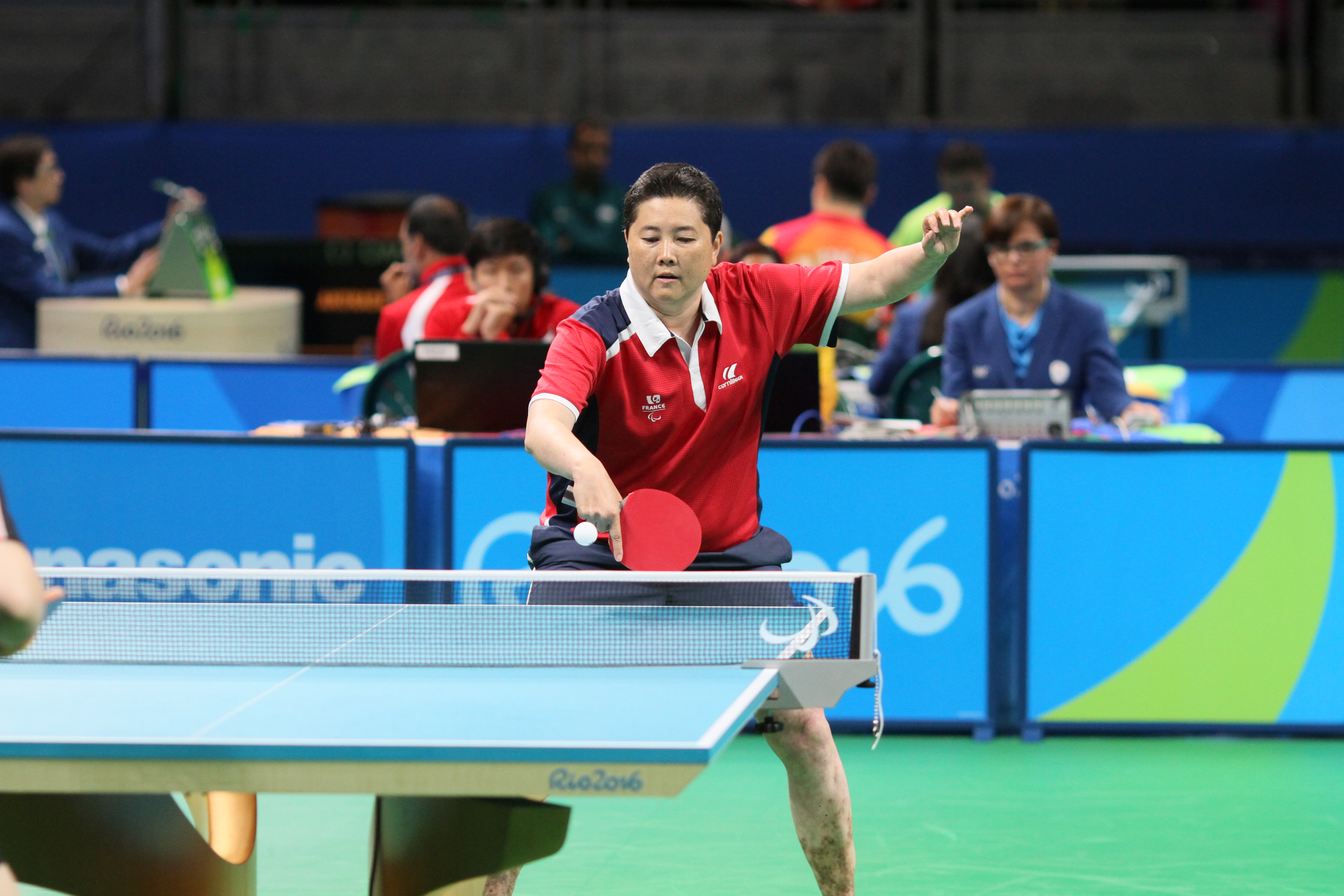 KAMKASOMPHOU Thu (FRA,F8) IMG_4908